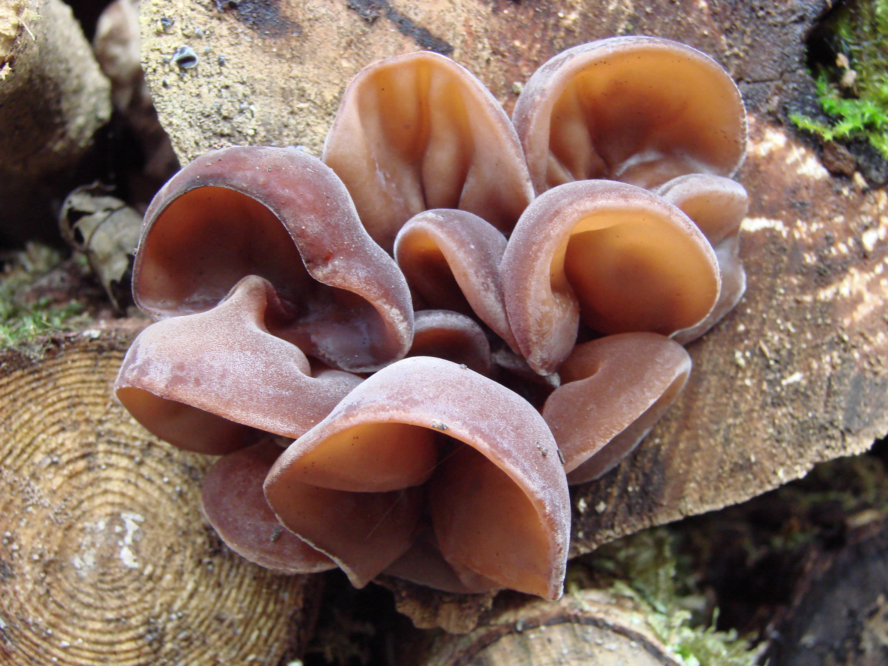 Jeunes sporophores d'oreille de Judas (Auricularia auricula-judae).